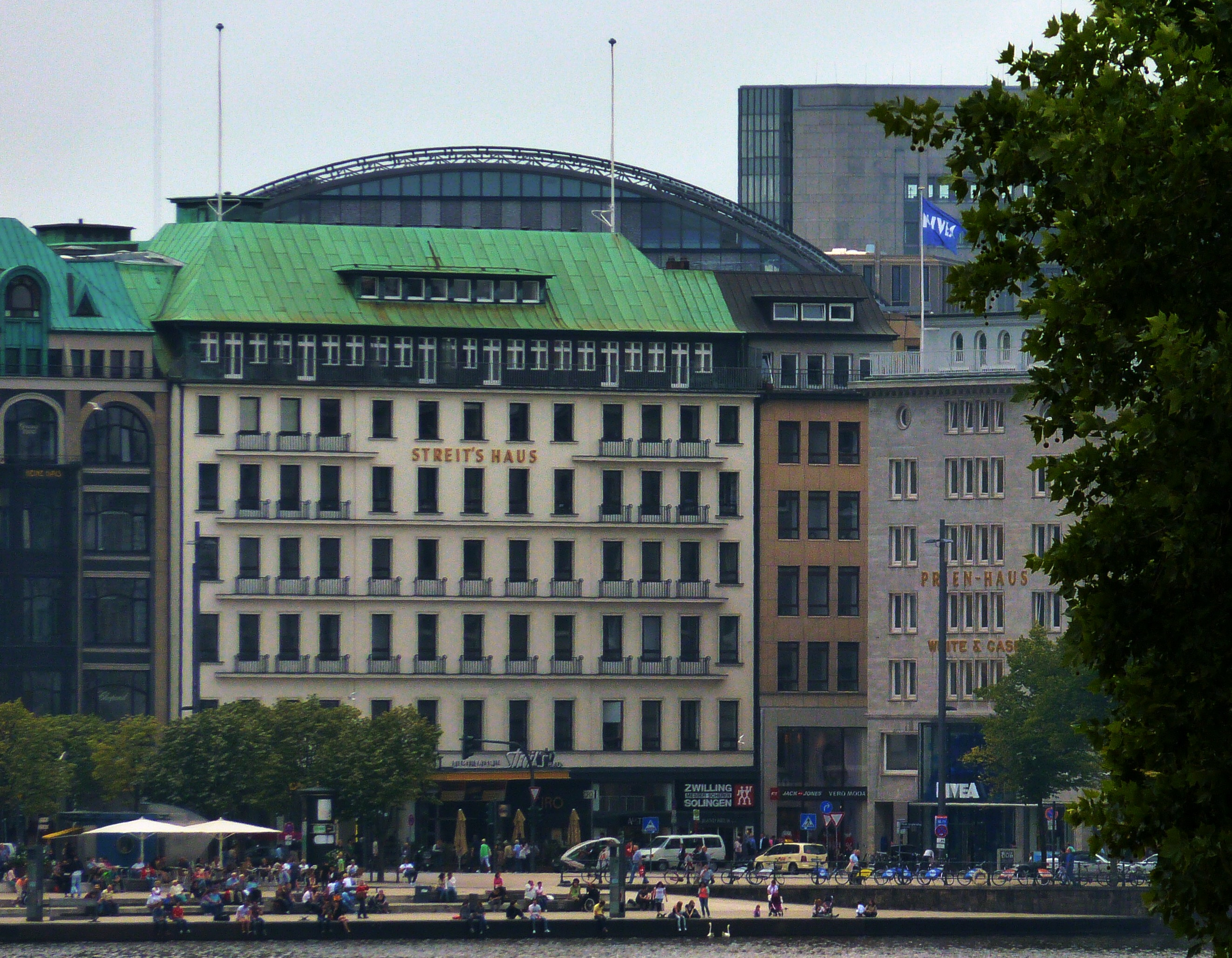 Das Streitshaus am Neuen Jungfernstieg